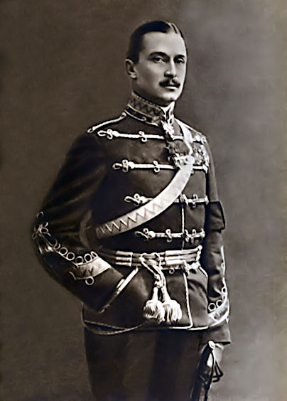 Mannerheim 52. Njezhnskin rakuunarykmentin eversti.